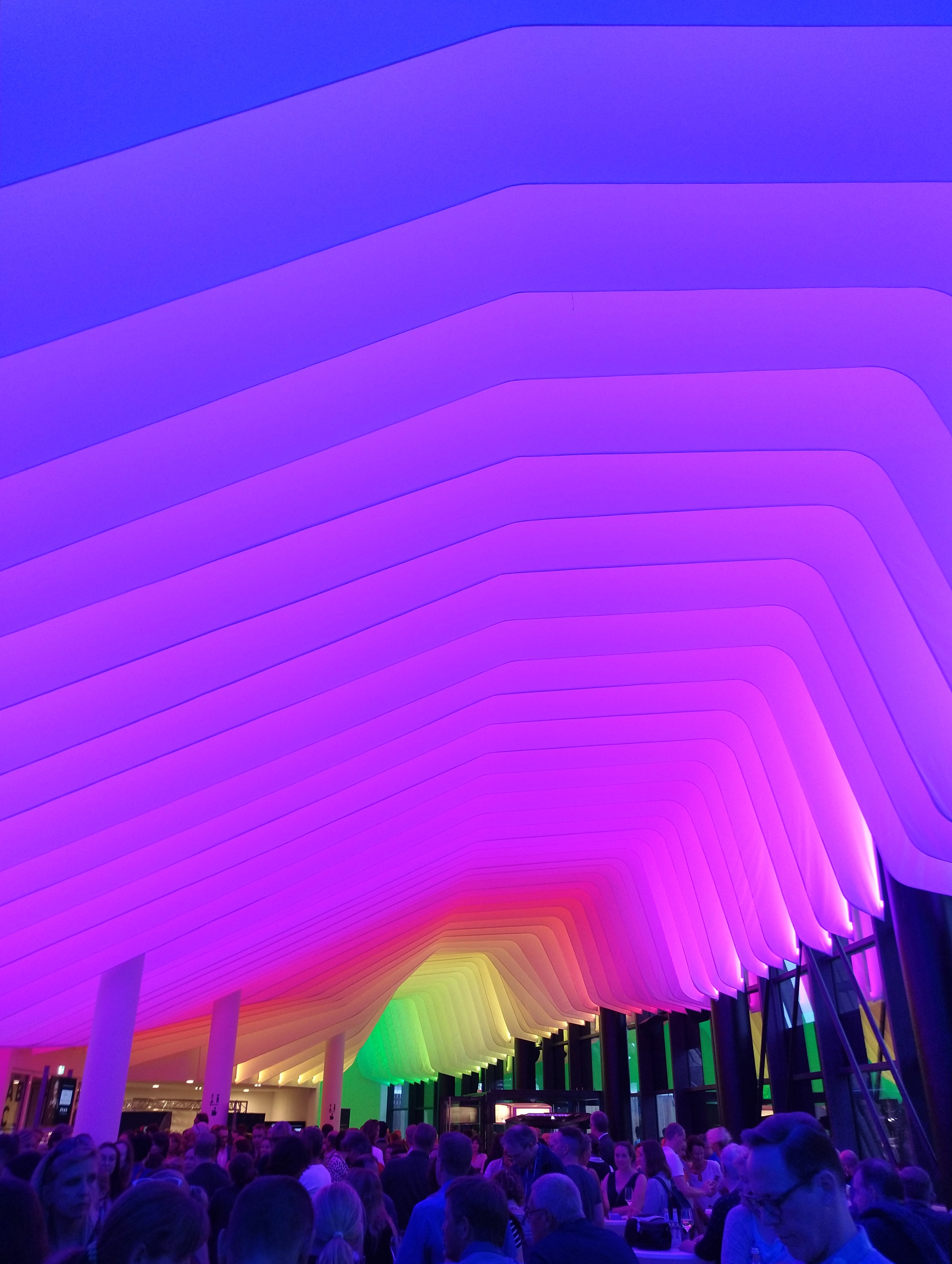 Regenbogen-Illumination im Foyer des Showpalast München (Fröttmaning)